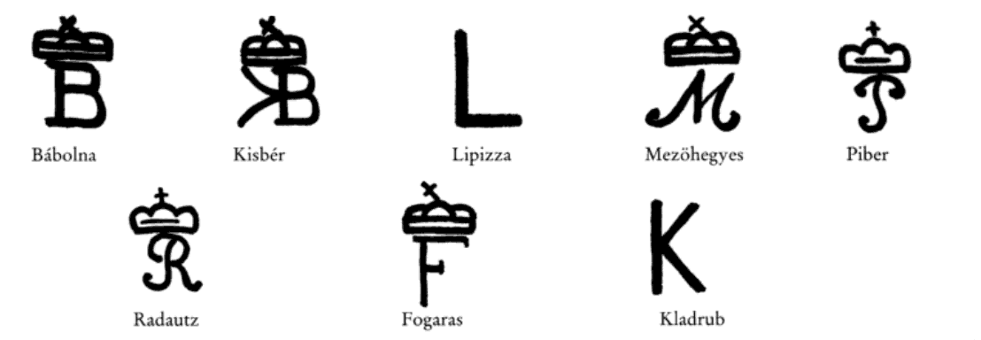 Die Gestütsbrände der österreichisch-ungarischen Staatsgestüte: oben von links Bábolna, Kisbér, Lipizza, Mezőhegyes, Piber, unten von links Radautz, Fogaras, Kladrub.